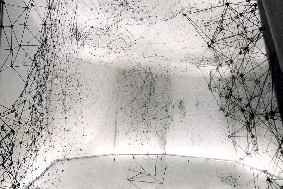 Reticularea